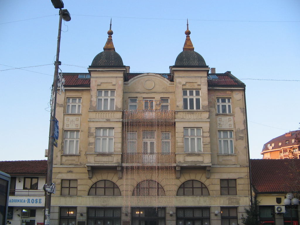 Cutural center in Leskovac, Serbia/Centre culturel de Leskovac, Serbie